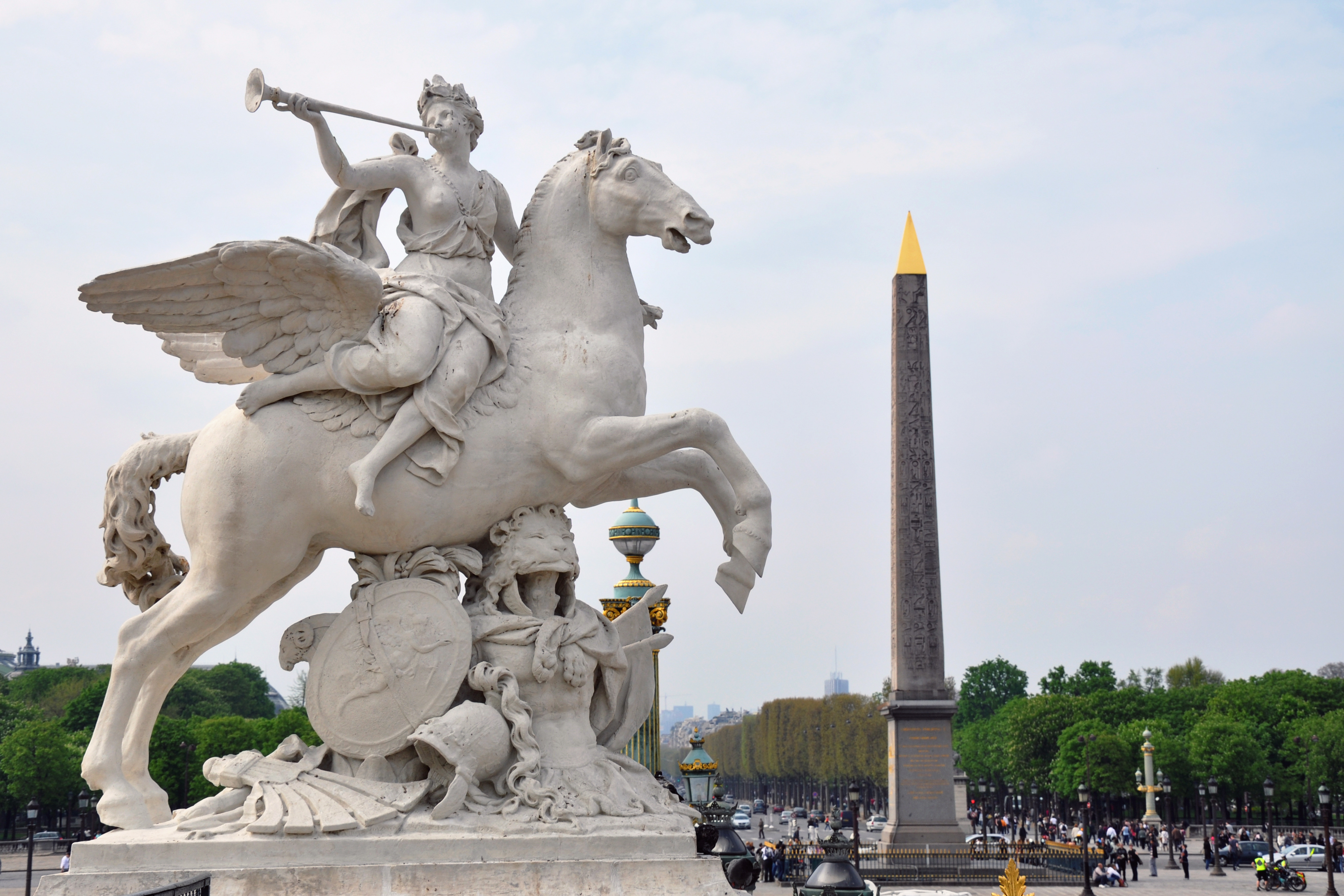 La Renommée du roi chevauchant Pégase, d'après Antoine Coysevox (1640-1720), Paris, jardin des Tuileries. Copie ayant remplacé en 1986 le marbre original conservé à Paris au musée du Louvre (pavillon Richelieu, cour Marly ).